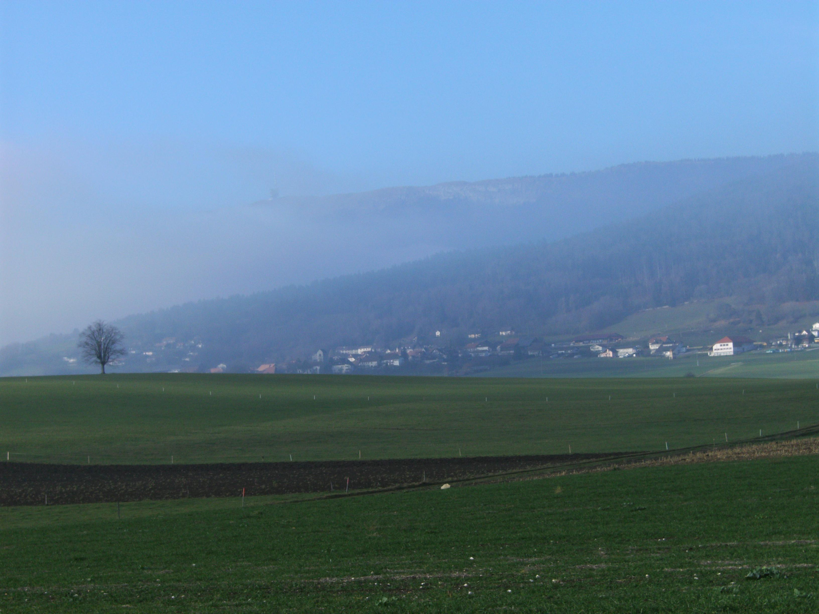 Prise de vue de Diesse et du Chasseral. Prise de la photo : depuis Prêles en direction du nord-ouest.